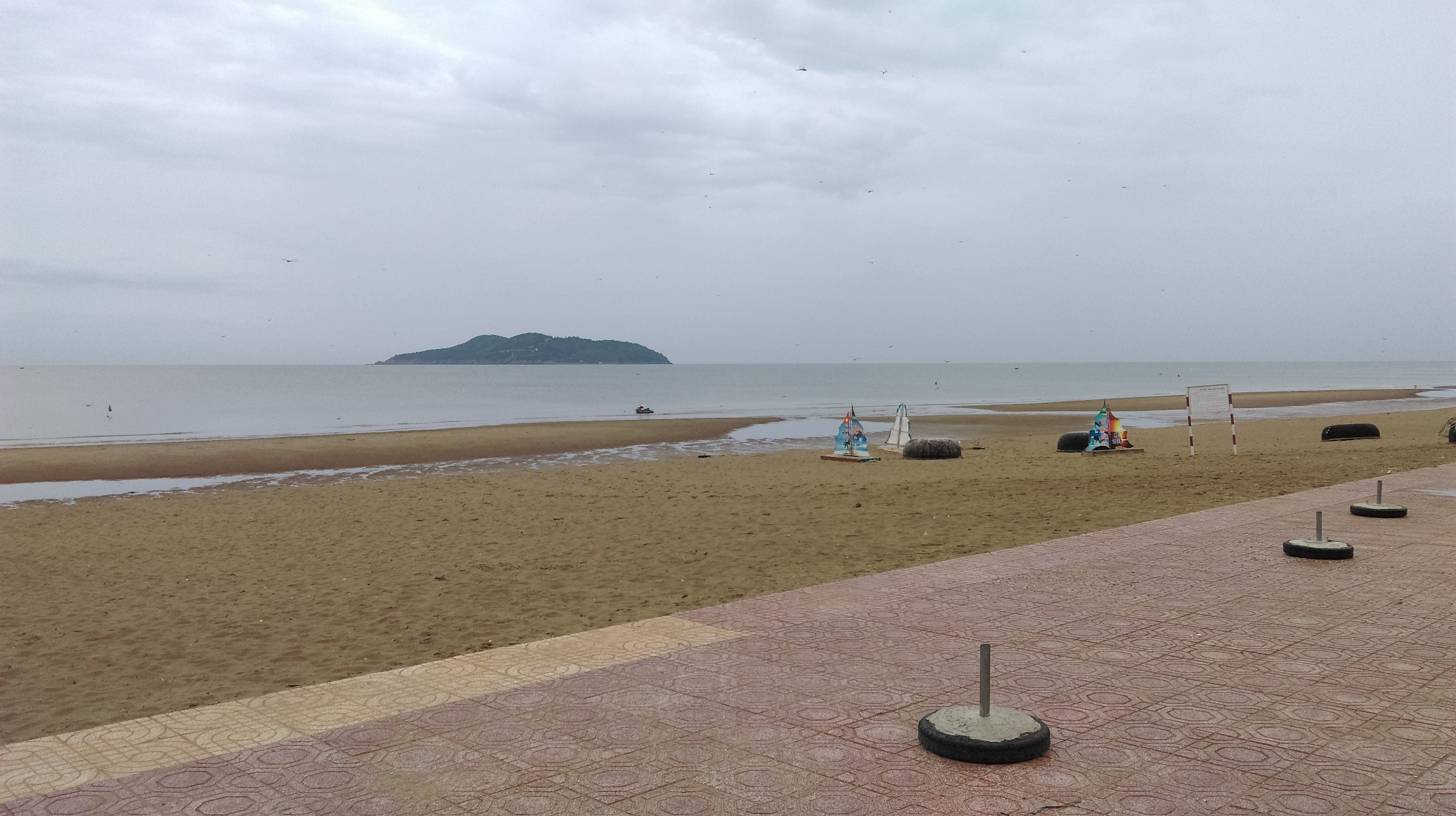 Hòn Ngư, Cửa Lò, Nghệ An